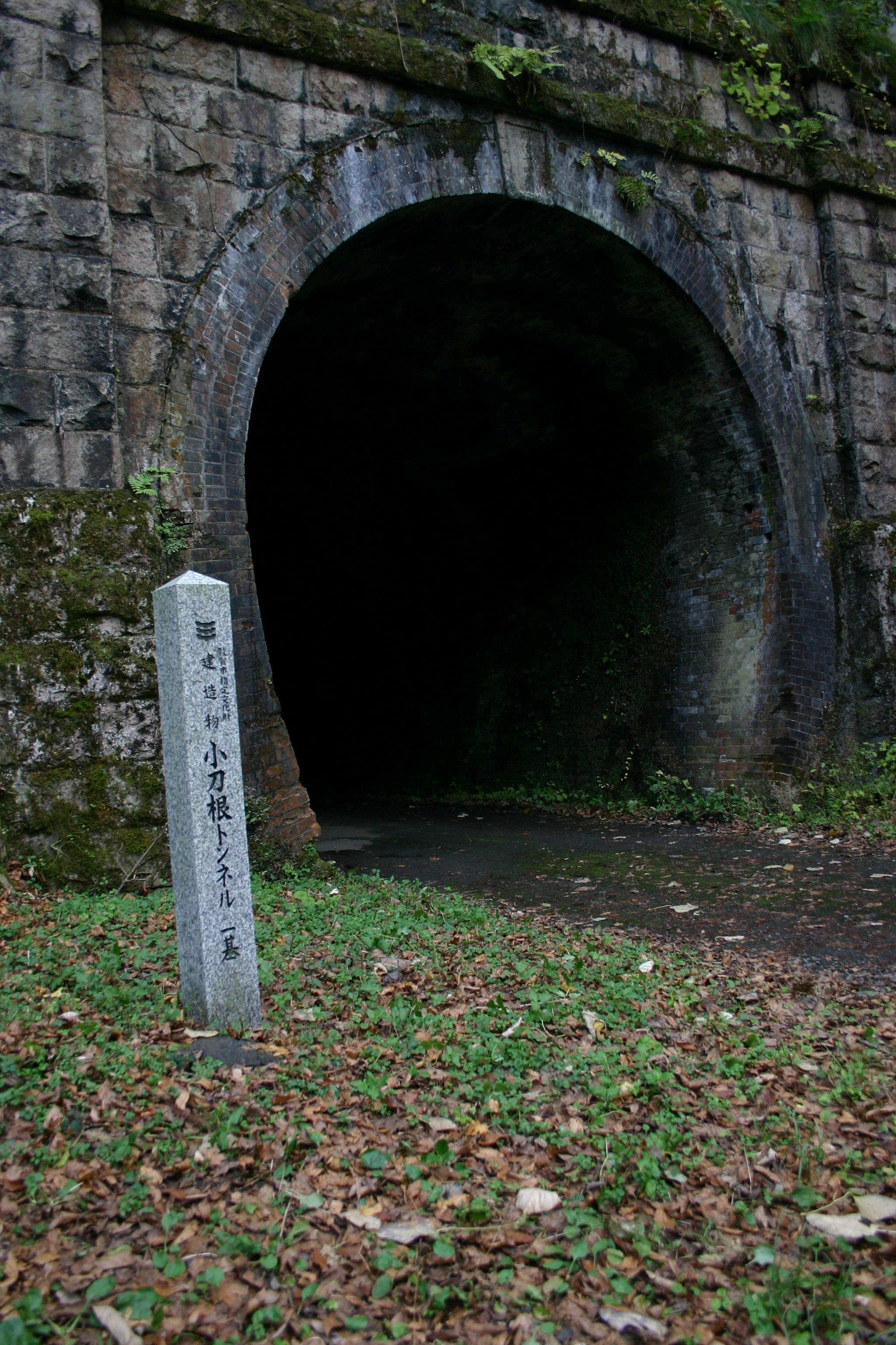 福井県敦賀市にある小刀根トンネル、鉄道黎明期の姿を留める国内最古のトンネル。